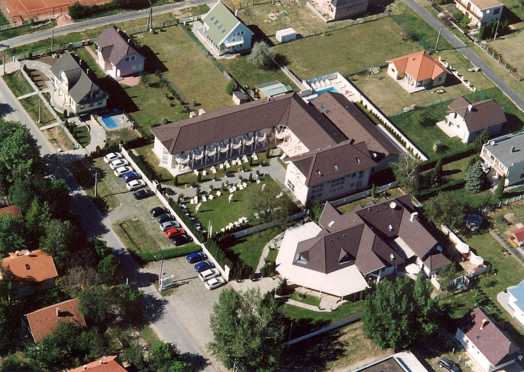 Zamárdi, Hungary, aerialphotography